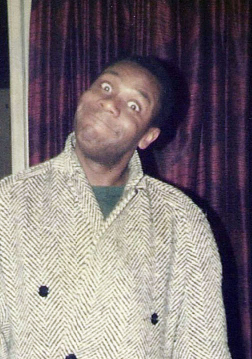 Lenny Henry